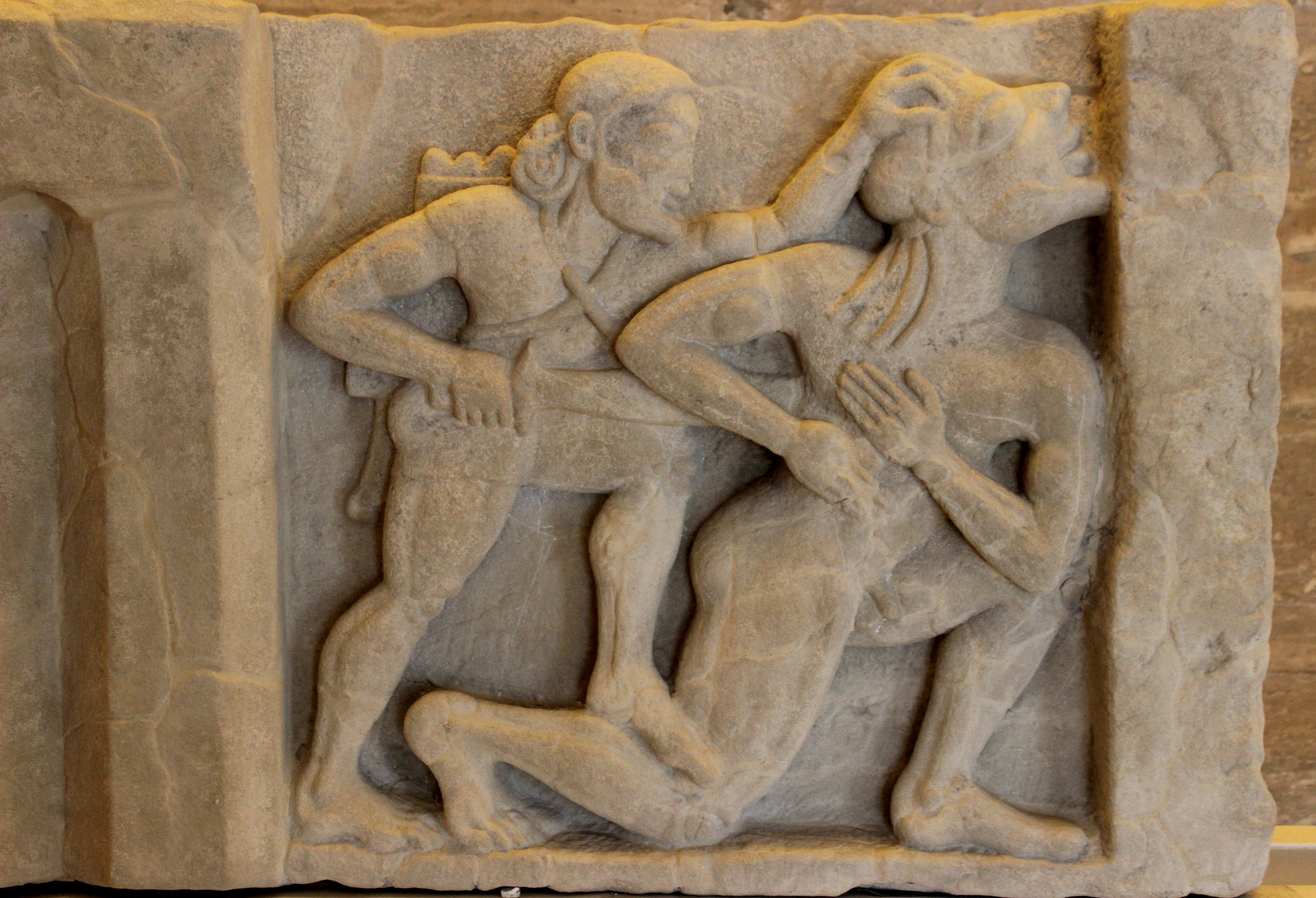 Paestum. Museo Archeologico Nazionale. Metopa del templo de Hera en la desembocadura del Sele. Hércules mata al gigante Alcioneo.